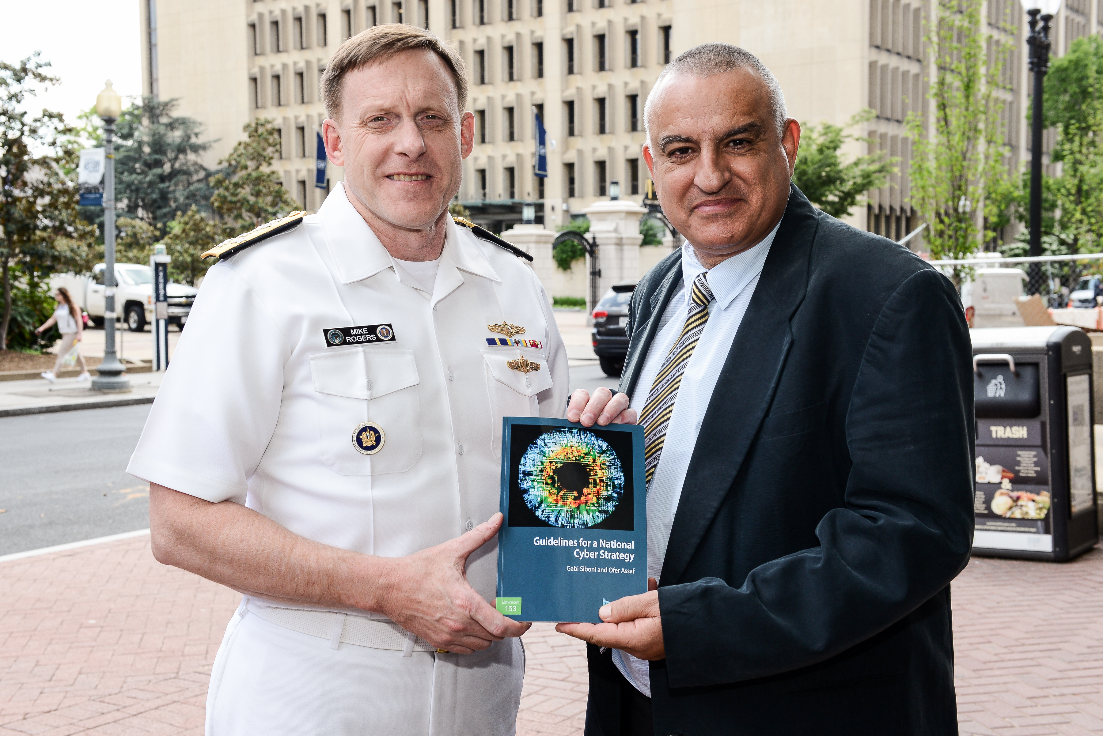 האדמירל מייקל רוג'רס וד"ר גבי סיבוני (מימין) בכנס ה-DCOI בוושינגטון די. סי., מאי 2016